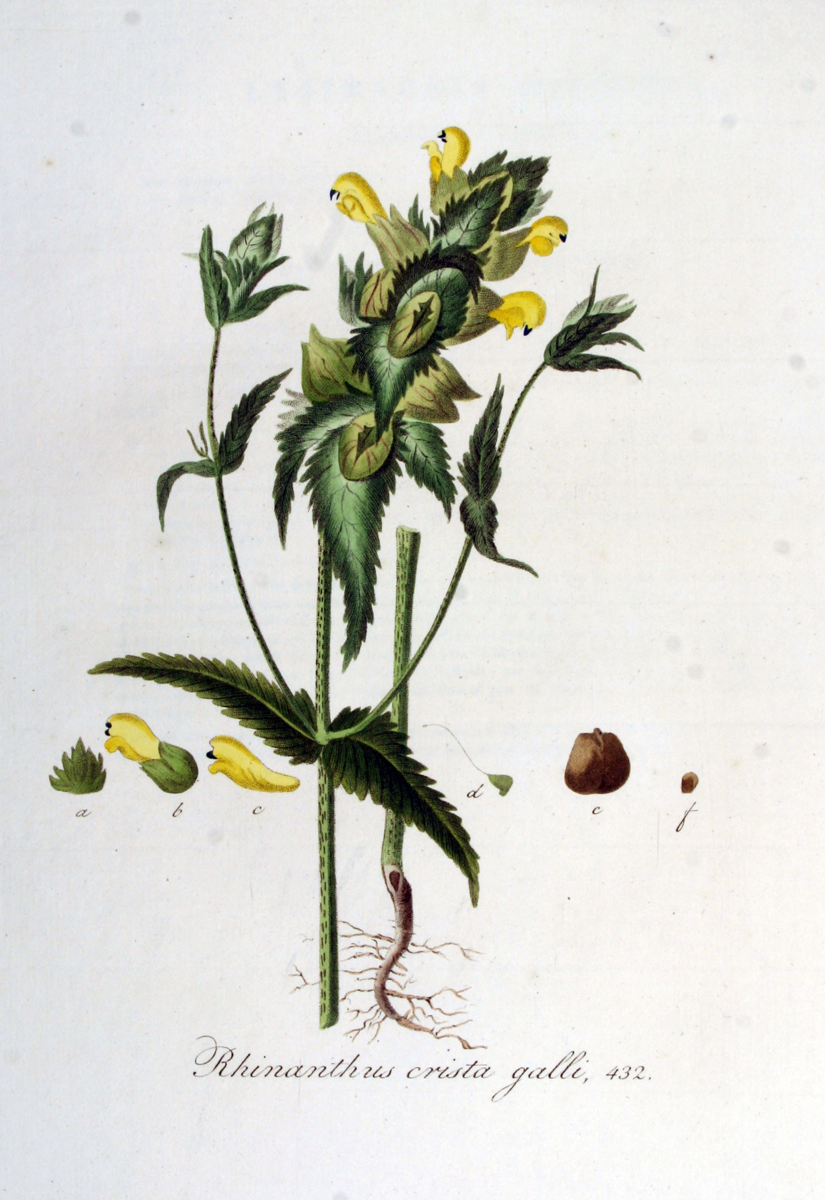 Rhinanthus angustifolius C.C. Gmel. (Syn. Rhinanthus crista-galli L., nomen confusum)